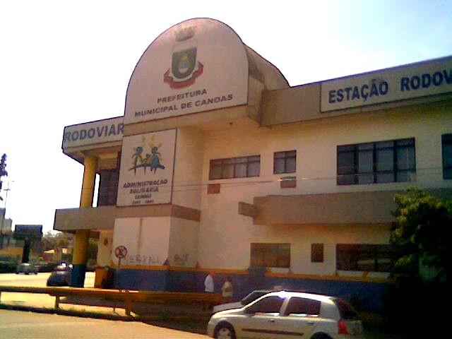 Estação rodoviária de Canoas, no Rio Grande do Sul